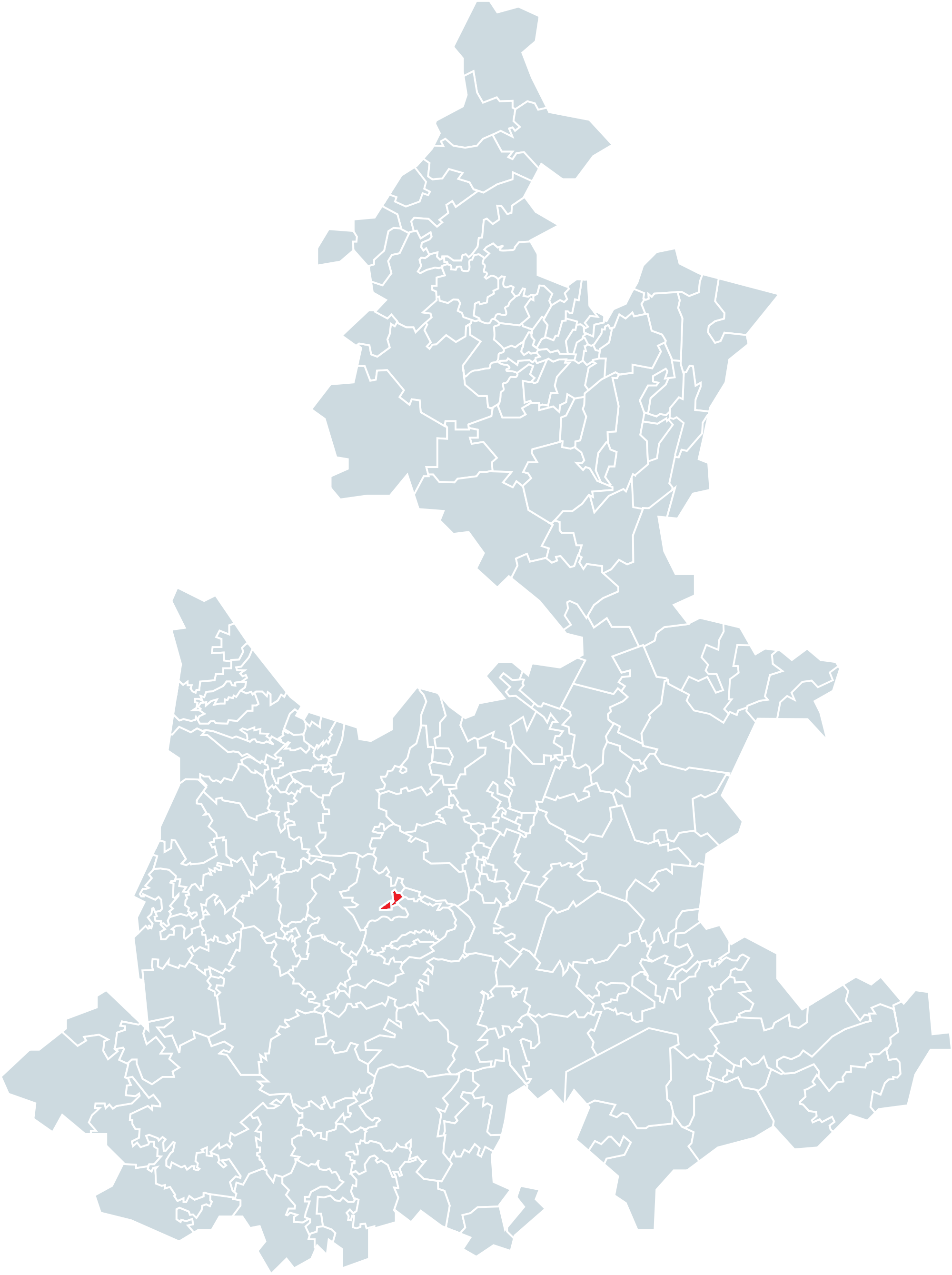 Municipio de La Magdalena Tlalauquitepec